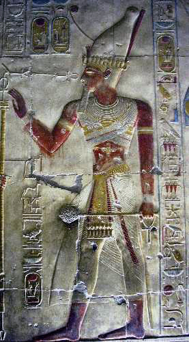 Temple de Sethi 1er, Abydos